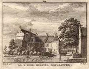 Deze afbeelding is een kopergravure van Hendrik Spilman (1721-1784), afkomstig uit “Het verheerlykt Nederland of Kabinet van Hedendaagsche Gezigten”, dat in de jaren 1745 tot 1774 werd uitgegeven door Isaak Tirion in Amsterdam. De afbeelding is genomen vanaf de originele kopergravures, in eigen (particulier) bezit.